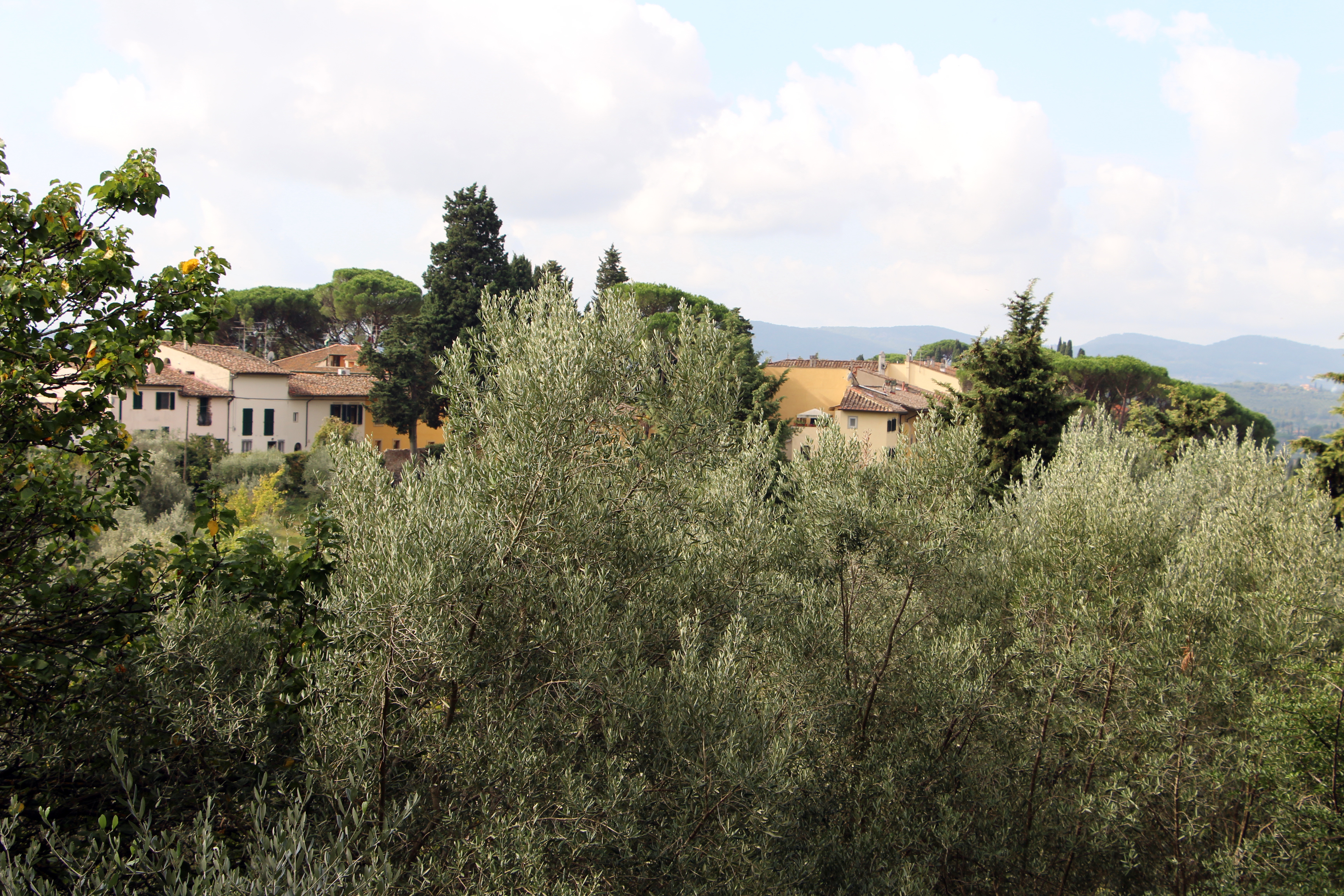 Villa Il Gioiello (Firenze)